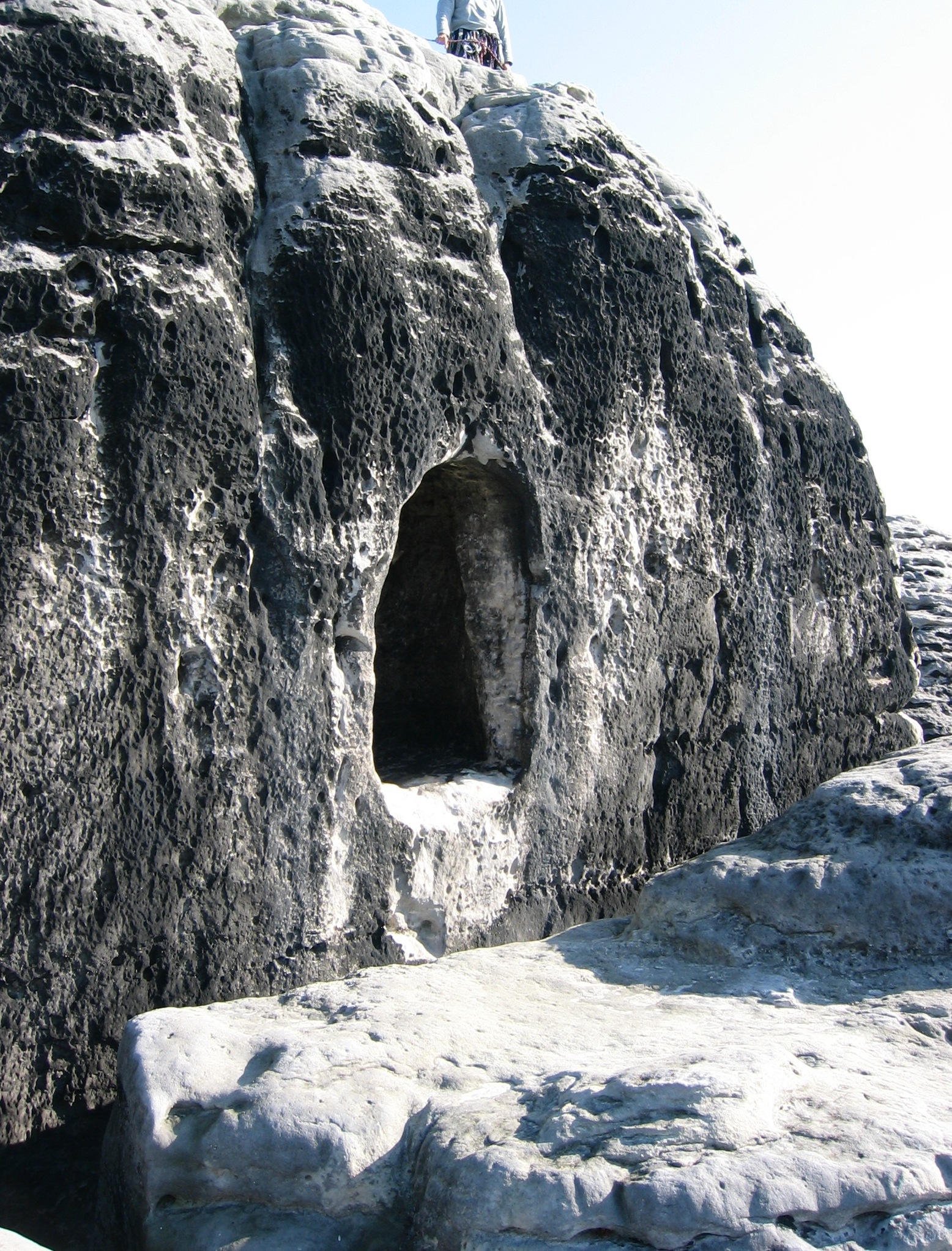 Das Mönchsloch am Mönch (Sächsische Schweiz)